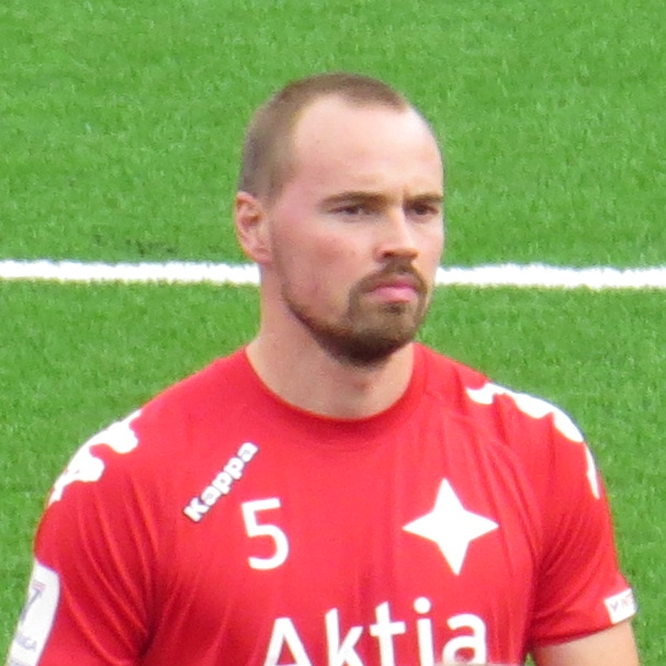 Jukka Sinisalo, suomalainen jalkapalloilija HIFK:n joukkueessa kaudella 2015.